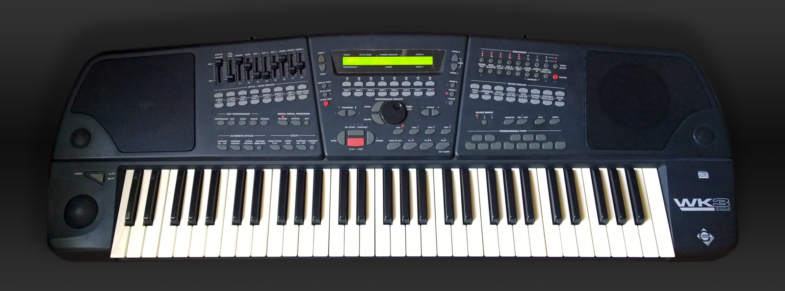 Una tastiera Genralmusic GEM wk3